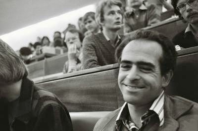 Foto di John Guckenheimer